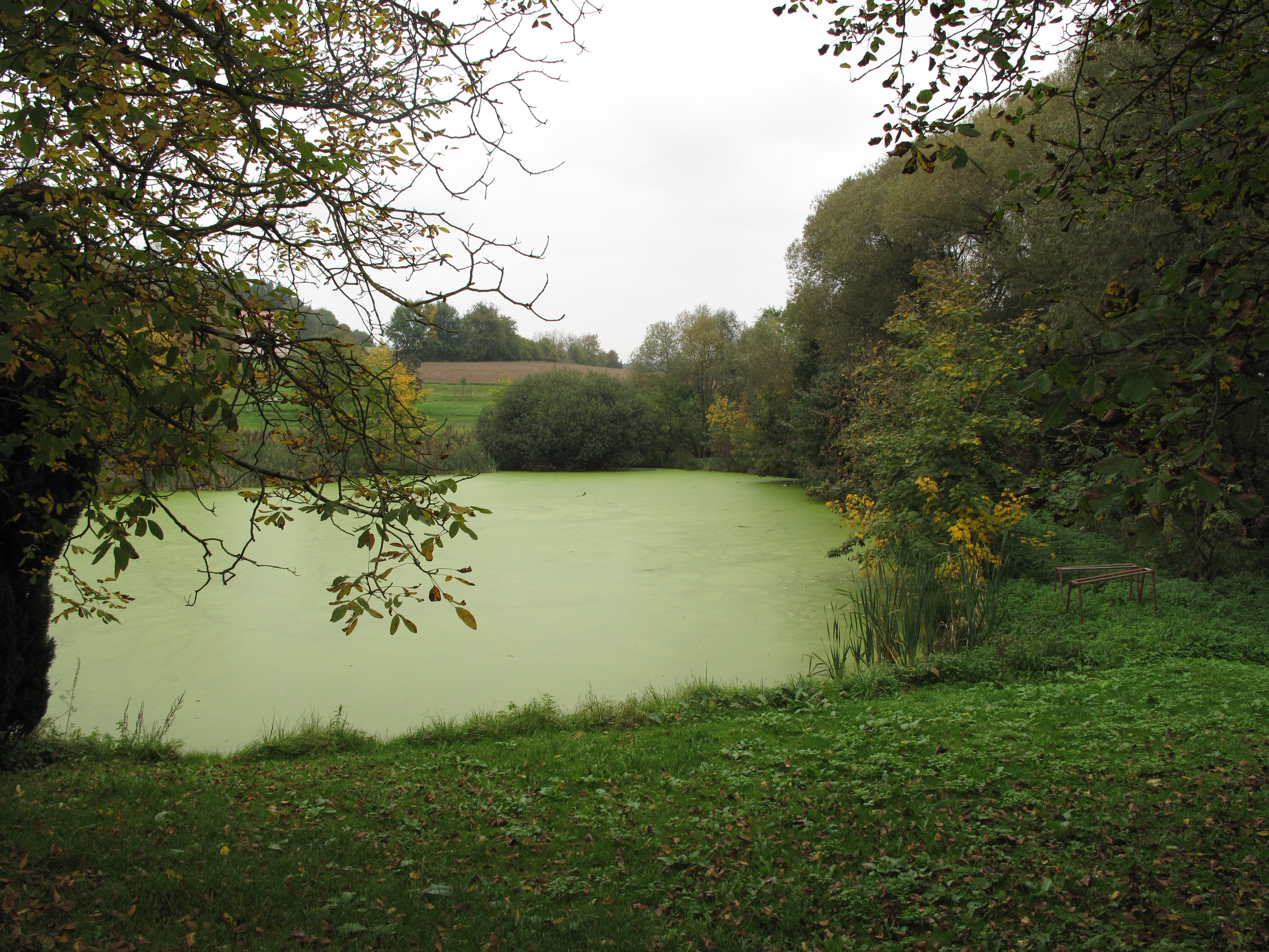 Rybník v Bedřichovicích. Okres Benešov, Česká republika.